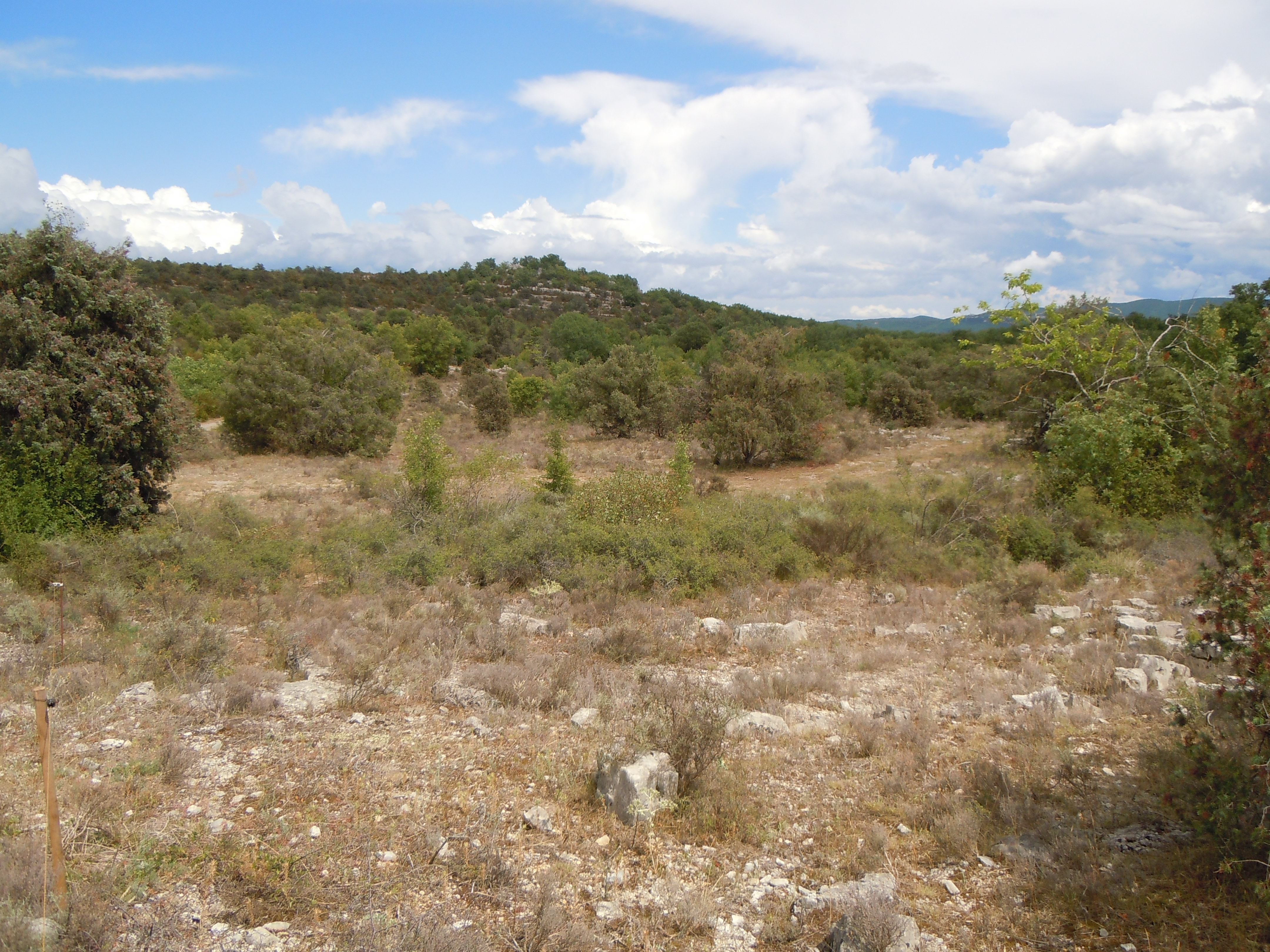 Plateau des Gras - Les Assions - Ardèche - France; cultures abandonnées à champ Redon, vue sur le Champel (alt 255m)